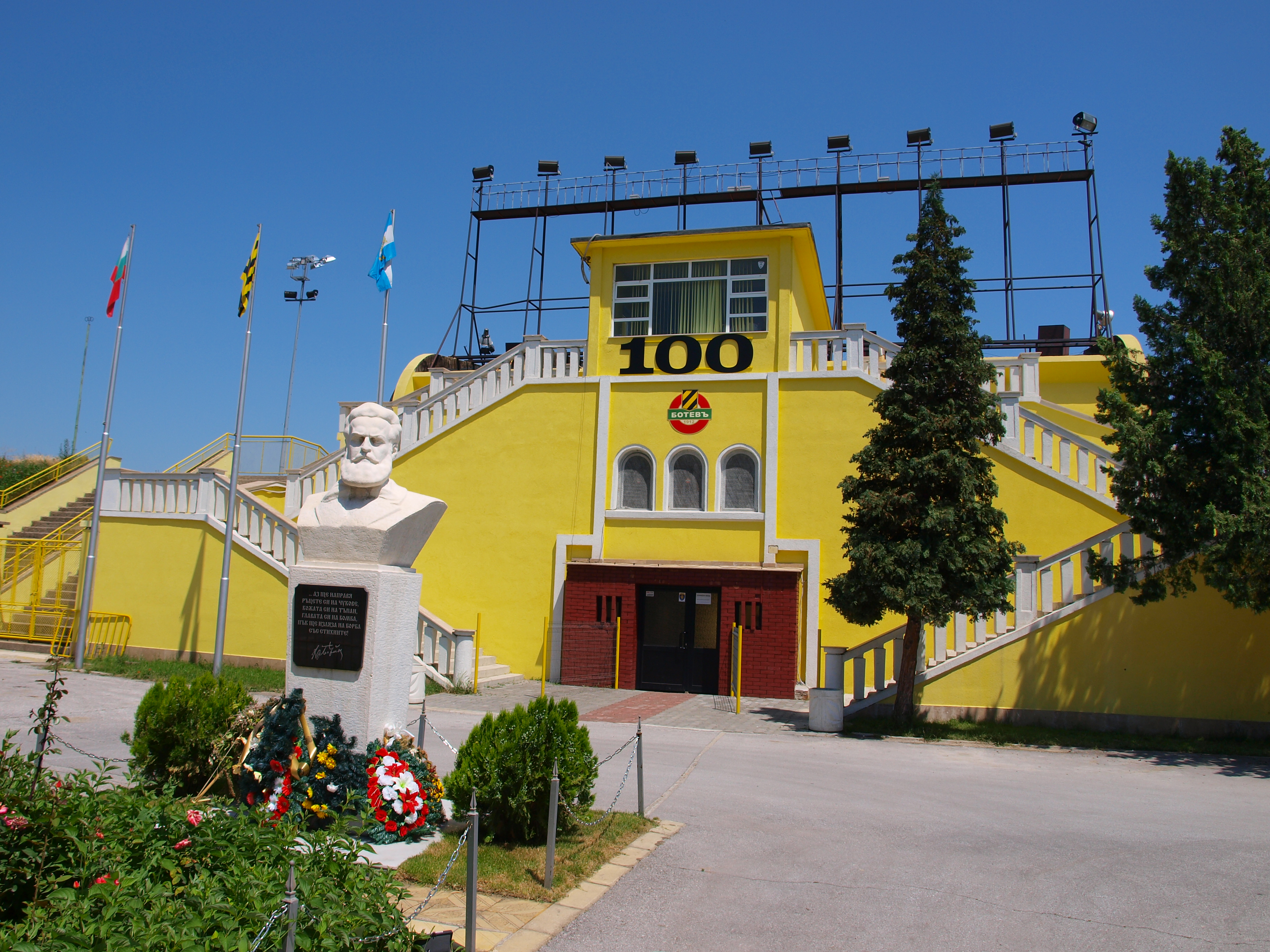 Hristo Botev Stadium in Plovdiv, home of PFC Botev Plovdiv